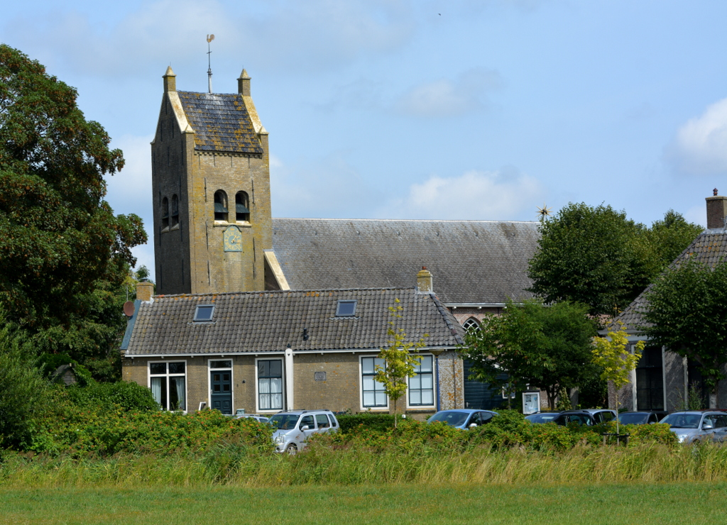 Tsjerke fan Iens